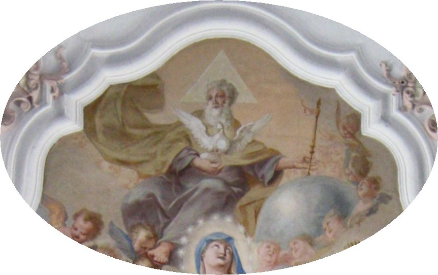 Dreifaltigkeit - Chorfresko (Ausschnitt) in der Pfarrkirche St. Laurentius und Elisabeth in Aulzhausen (Bayern) Die Dreifaltigkeits-Darstellung (Trinität) von Christoph Thomas Scheffler ist bemerkenswert. In der Mitte thront Gottvater, vor seiner Brust schwebt die Heilig-Geist-Taube und vor dieser ist Jesus Christus in Gestalt einer Hostie (Leib Christi) gegenwärtig (Ekklesia-Gedanke).